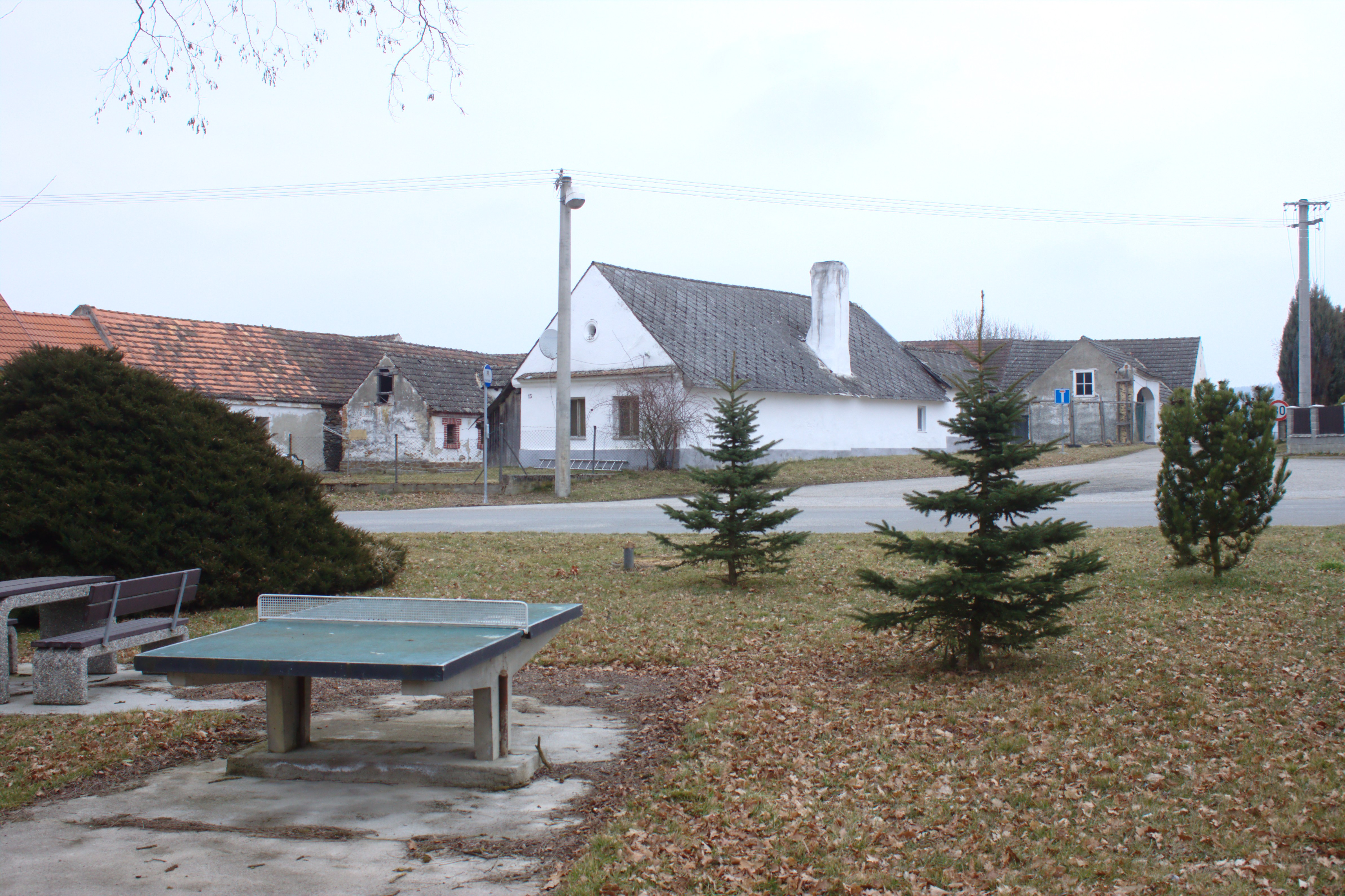 Náves s chalupou ve vesnici Jeznice Project: Fotíme Česko